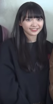 籾山ひめりです。